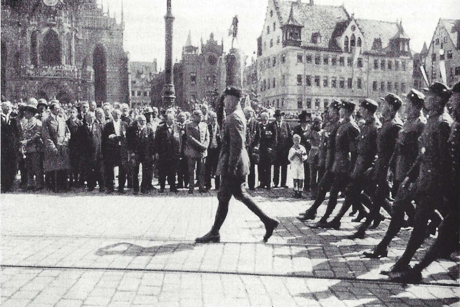 Erlanger Studenten im Bund Oberland auf dem Deutschen Tag in Nürnberg (2. September 1923)